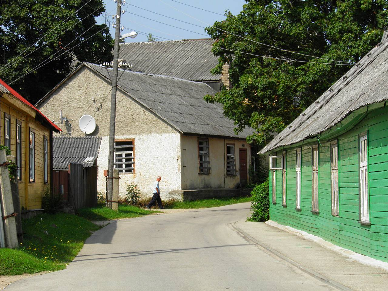 Peldu iela, Viesīte